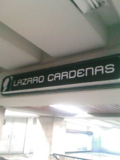 letrero de la estación Lazaro Cardenas